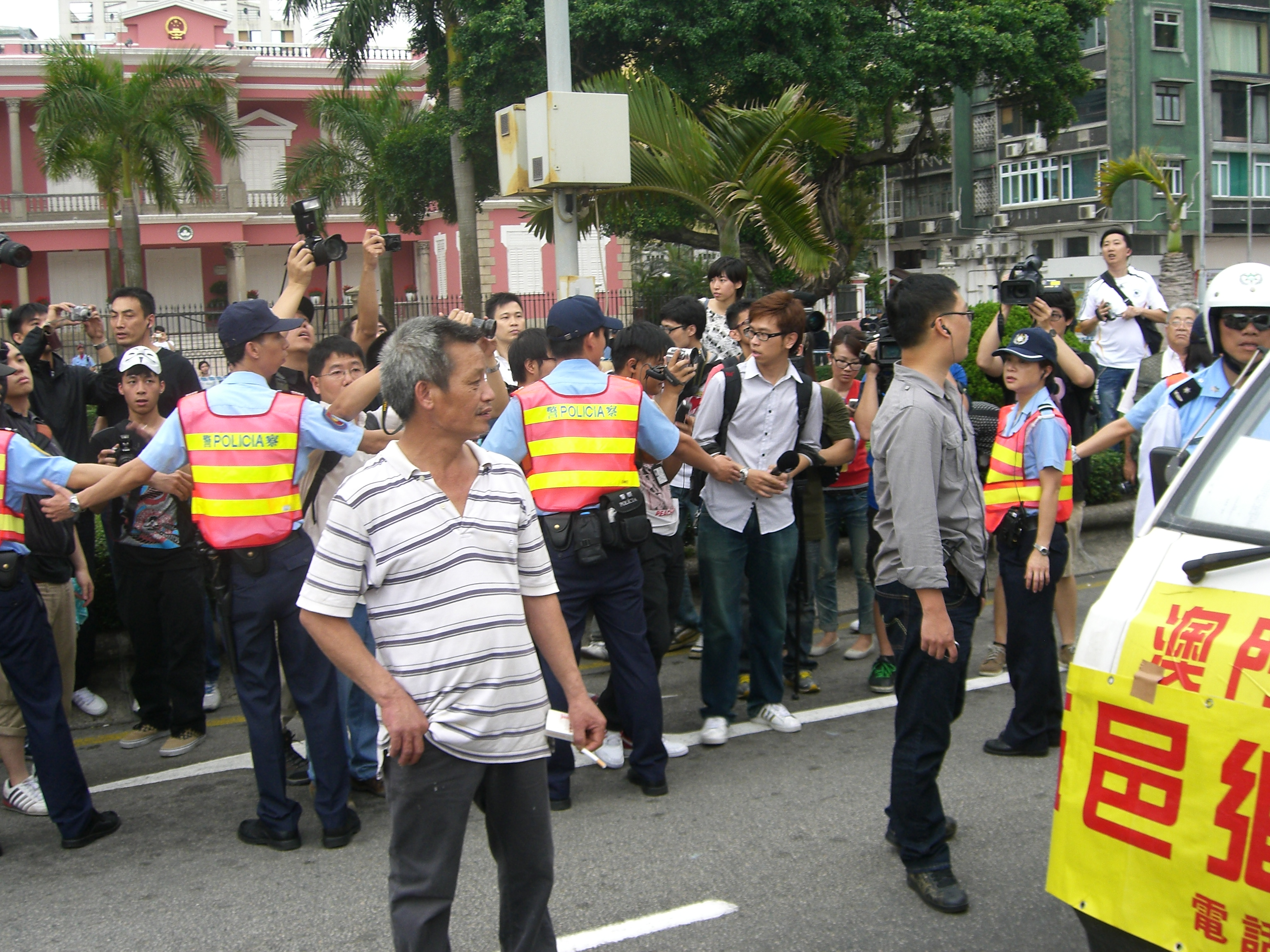 2011年澳門勞動節遊行